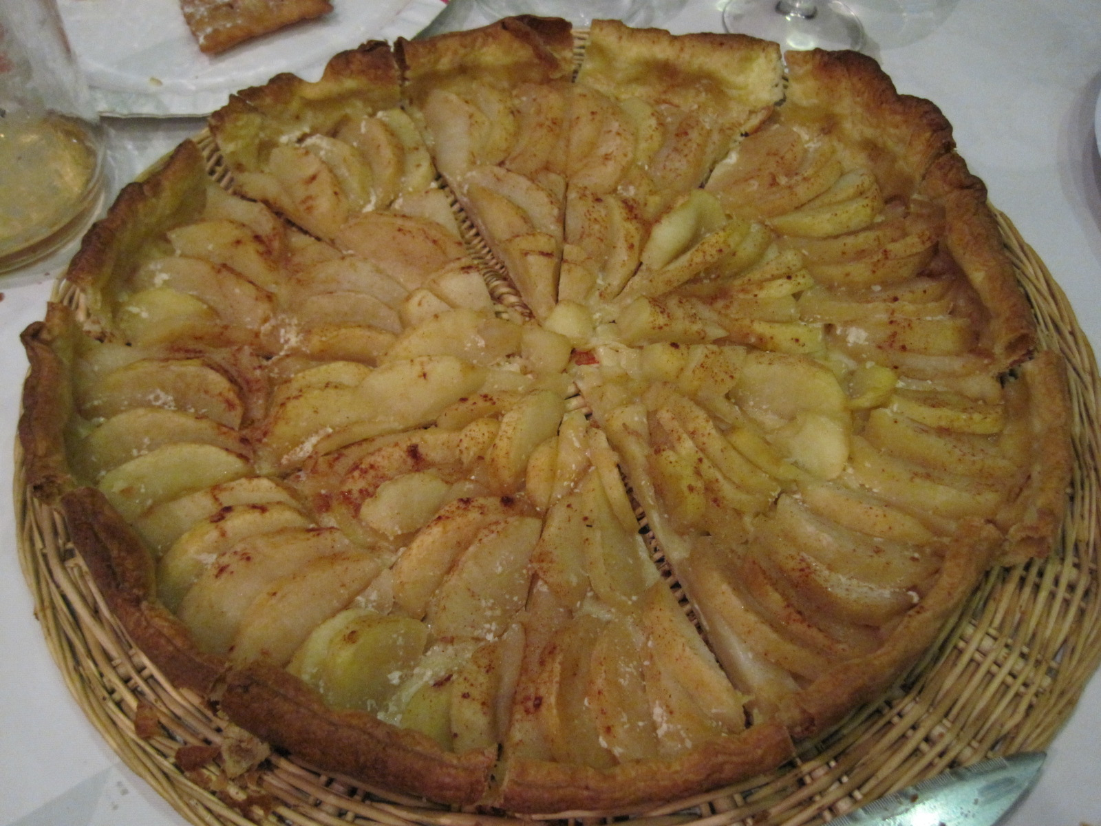 Tarte à la pomme de Marie-Thérèse Grappe - Editée par Arnaud 25